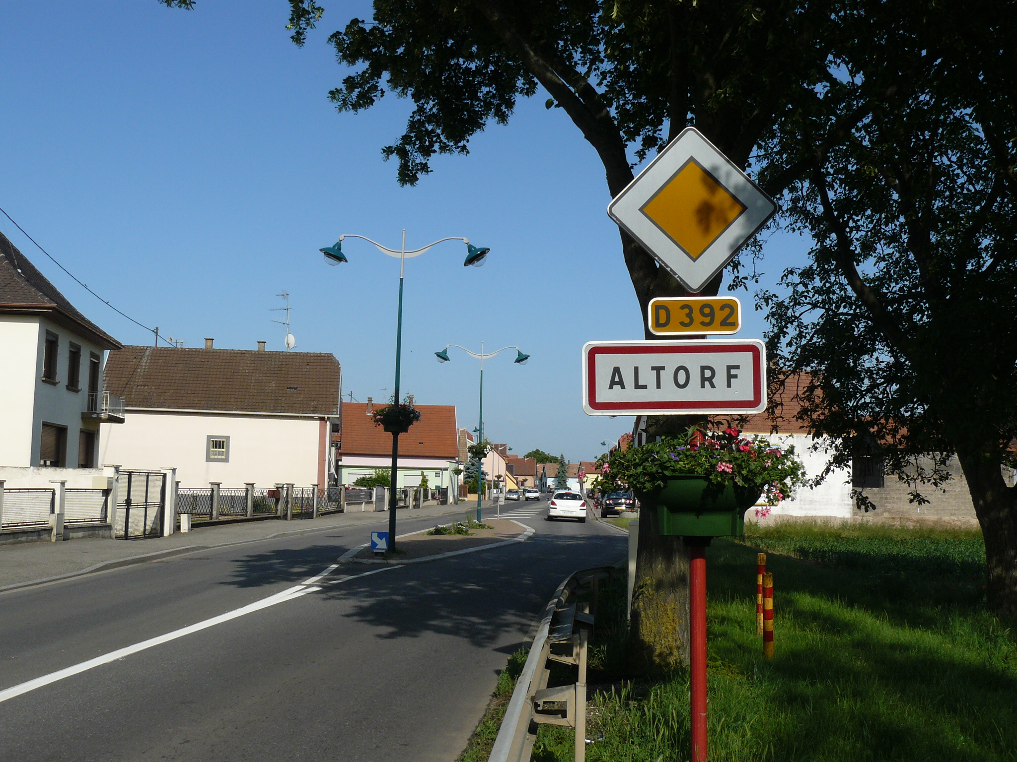 Entrée du village d'Altorf